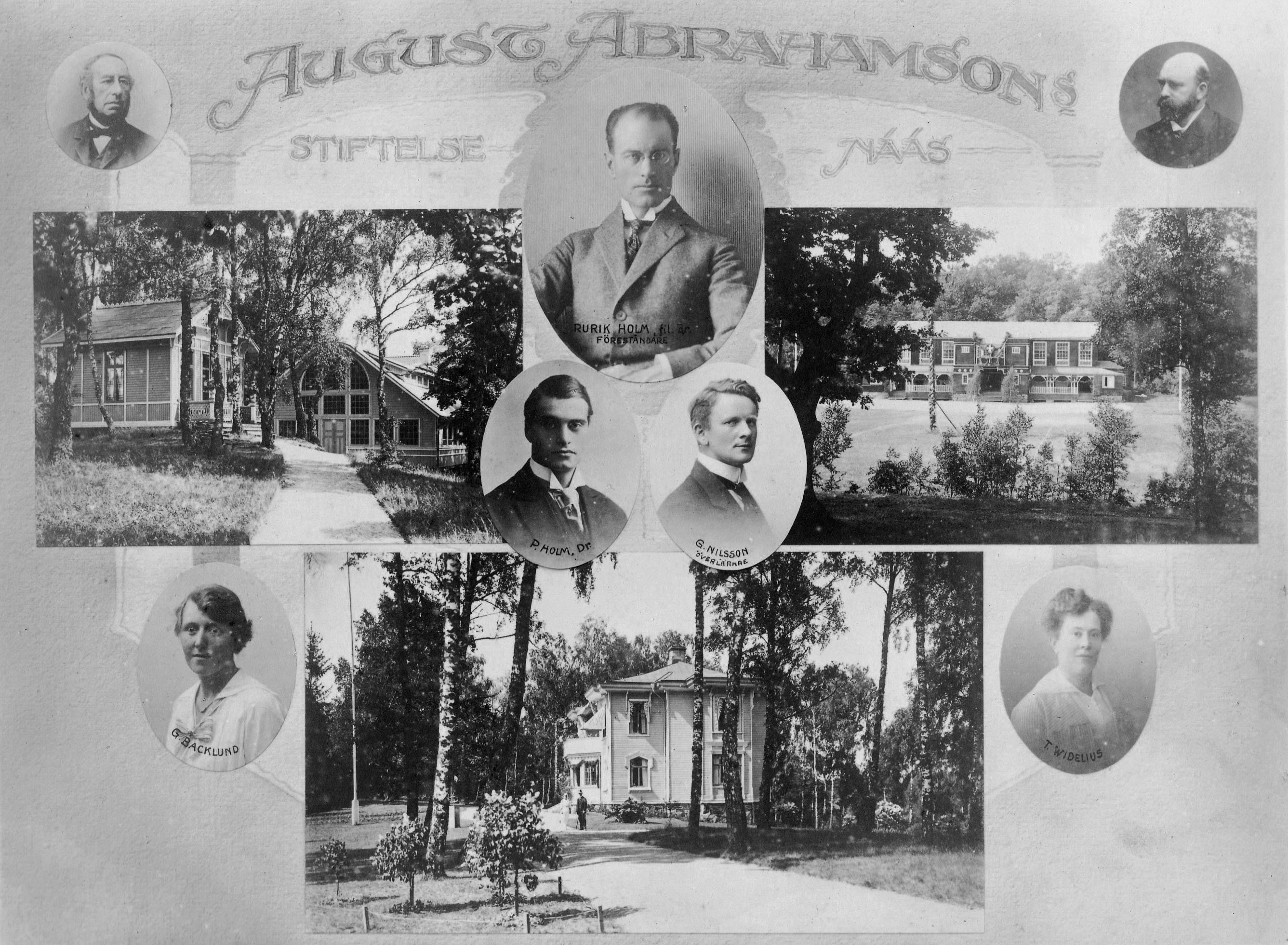 slöjdkurs